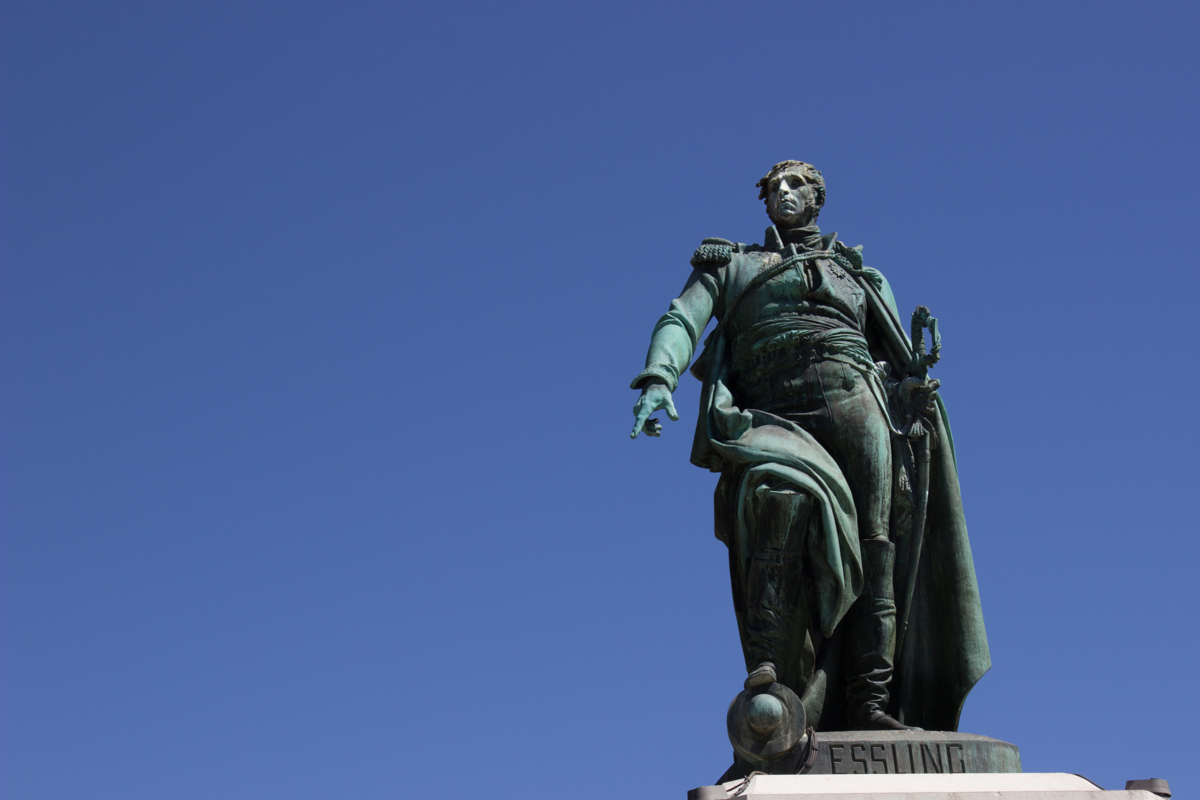 Statue de Masséna à Nice